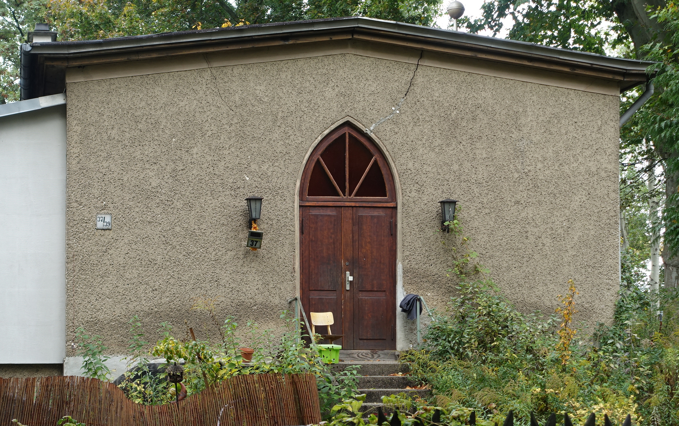 ehem. Gartenhaus